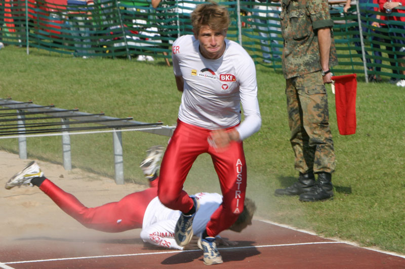 Militärischer Fünfkampf Hindernisbahn-Staffellauf Österreichische Mannschaft